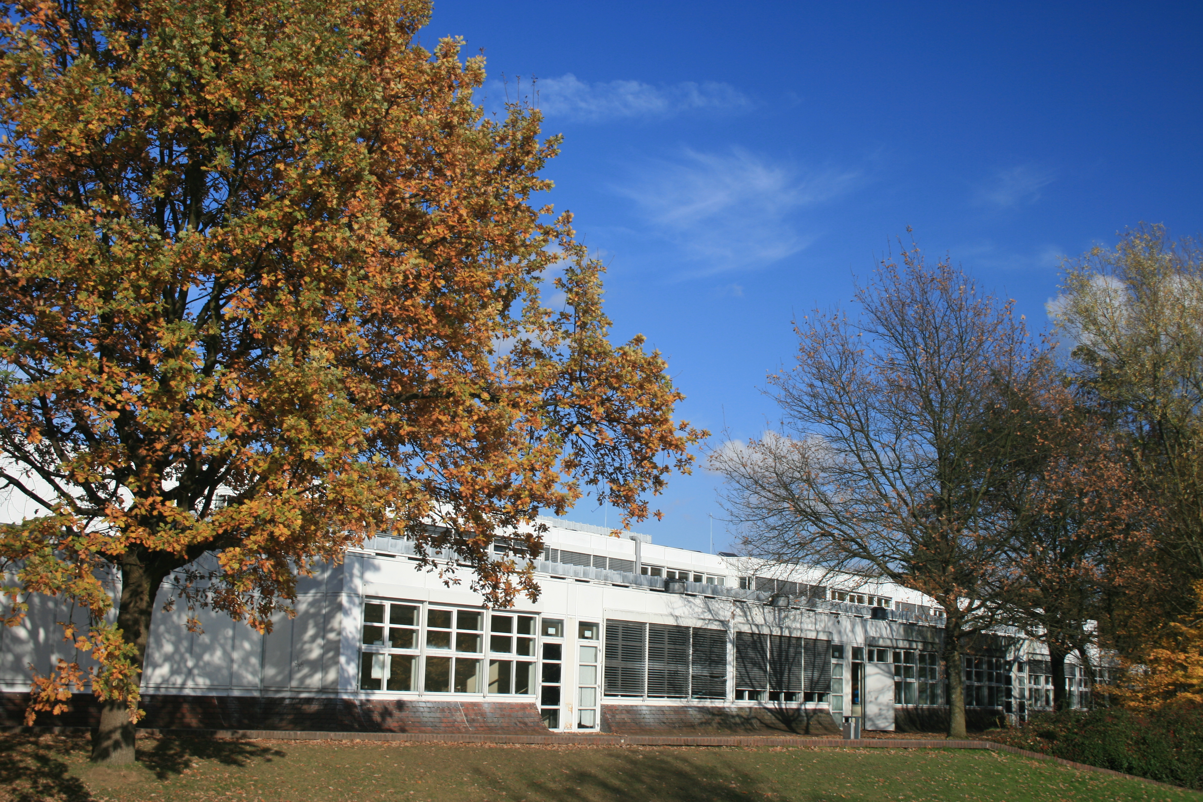 Gebääude des Gymnasiums Vogelsang im Herbst 2008